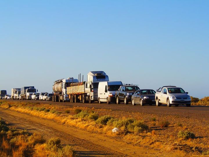 Vista del corte de ruta